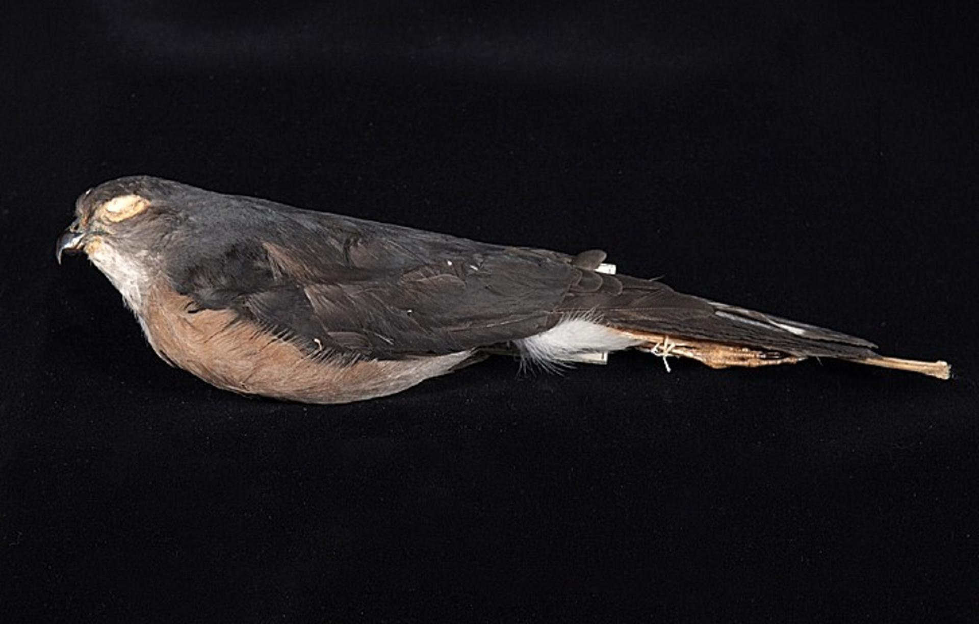 Accipiter nanus Blasius, W.H., 1897